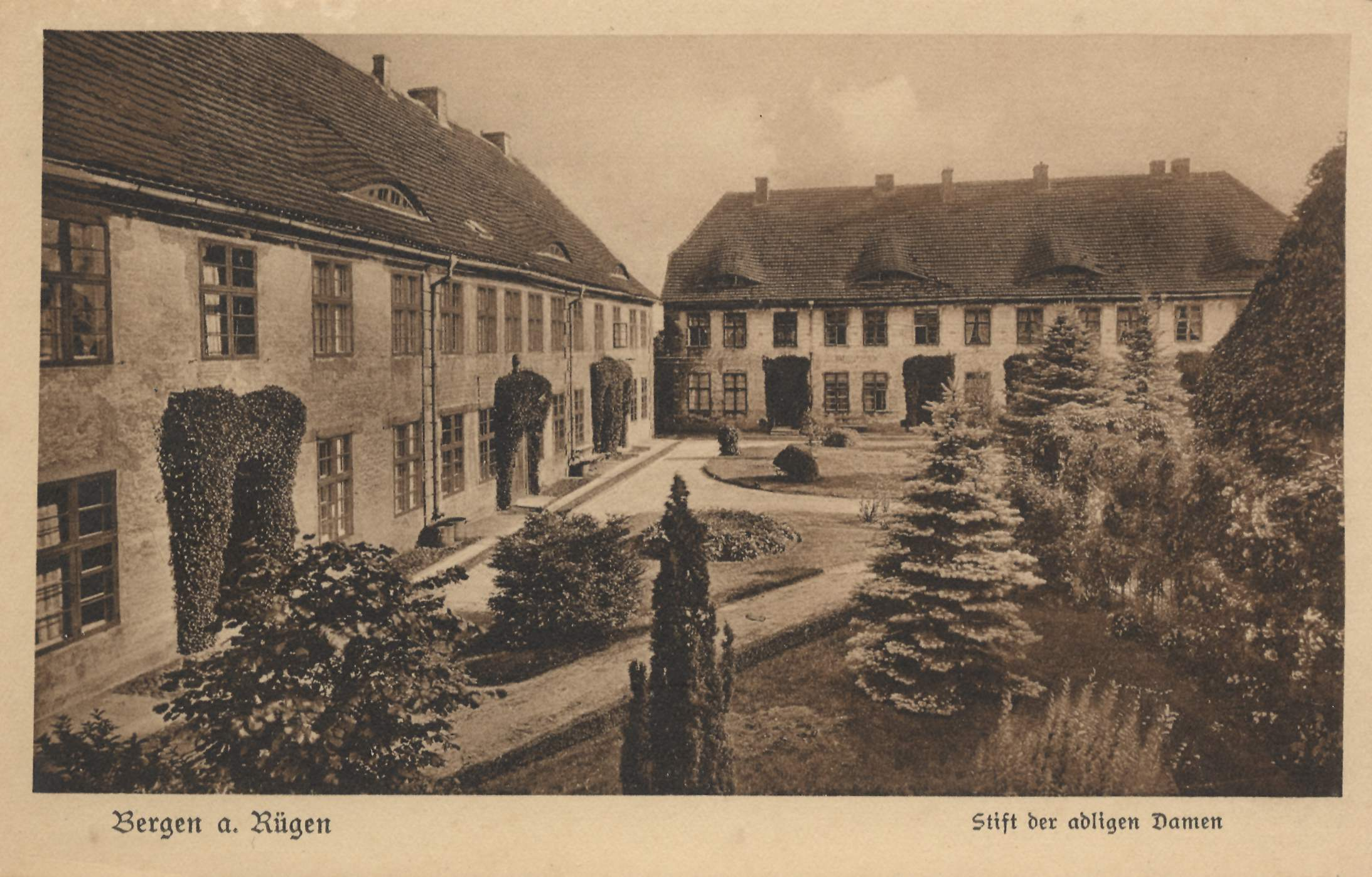 Bergen auf Rügen. Stift der adligen Damen.